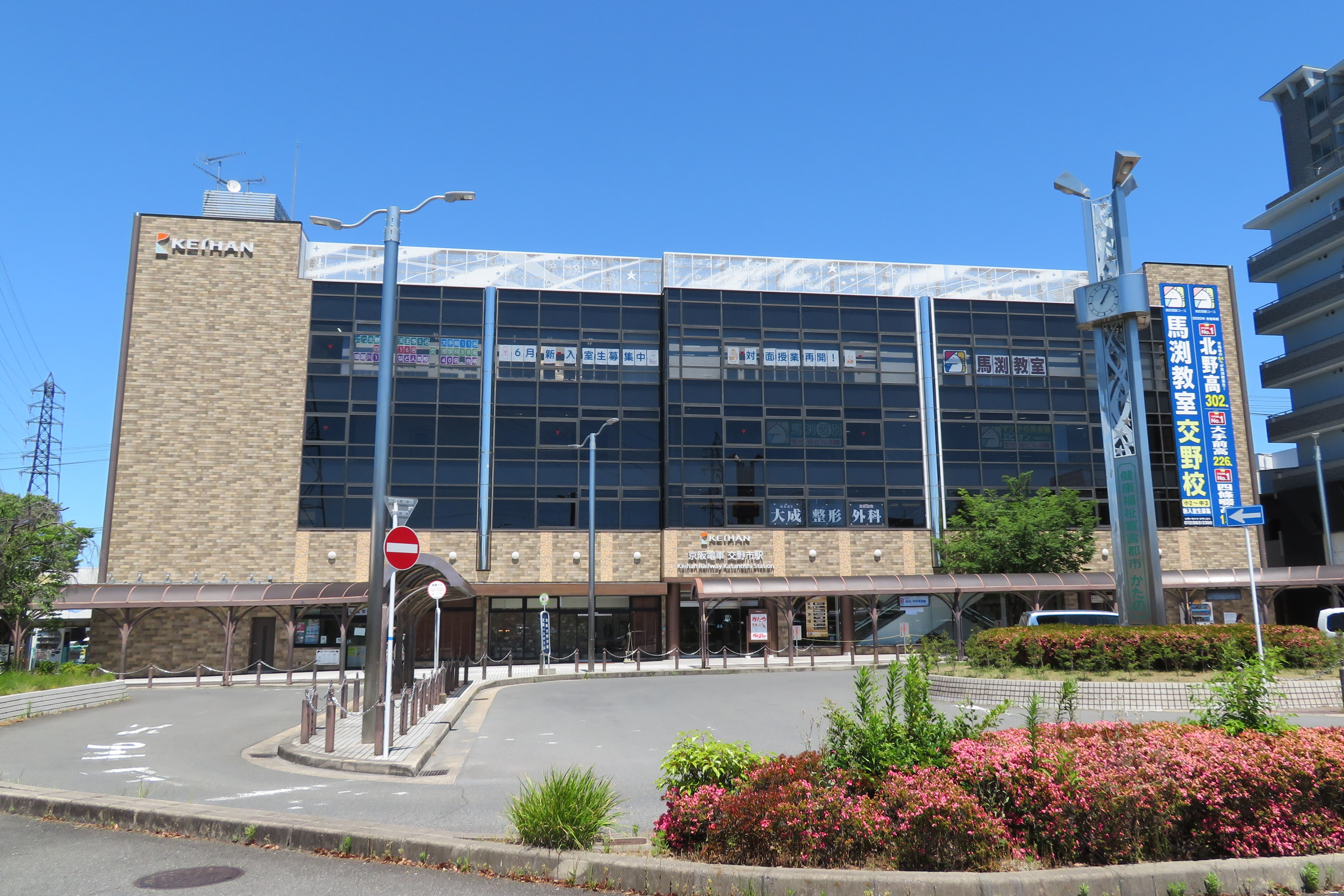 京阪電鉄交野市駅